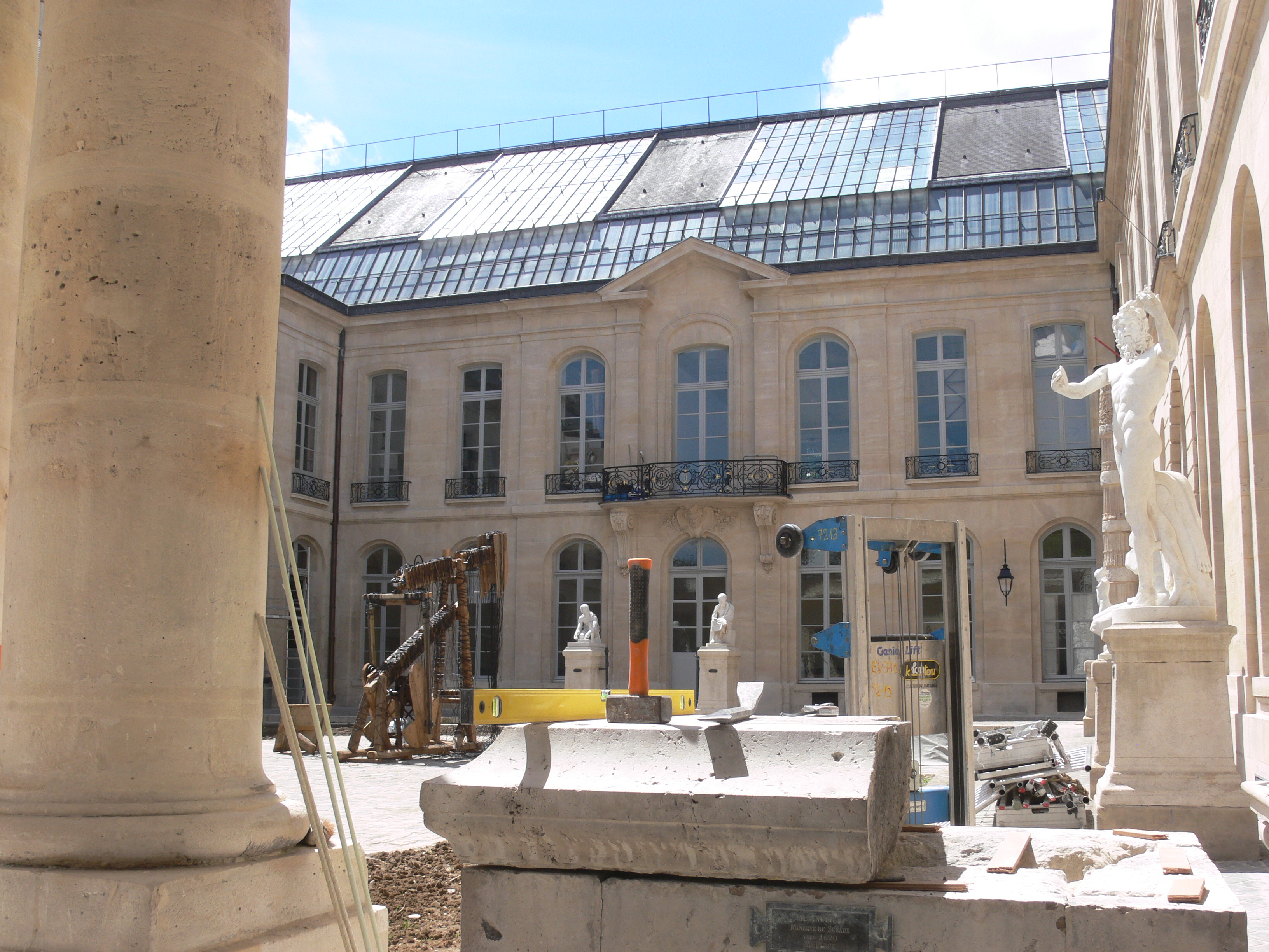 Paris - hôtel de Chimay - Cour en travaux .